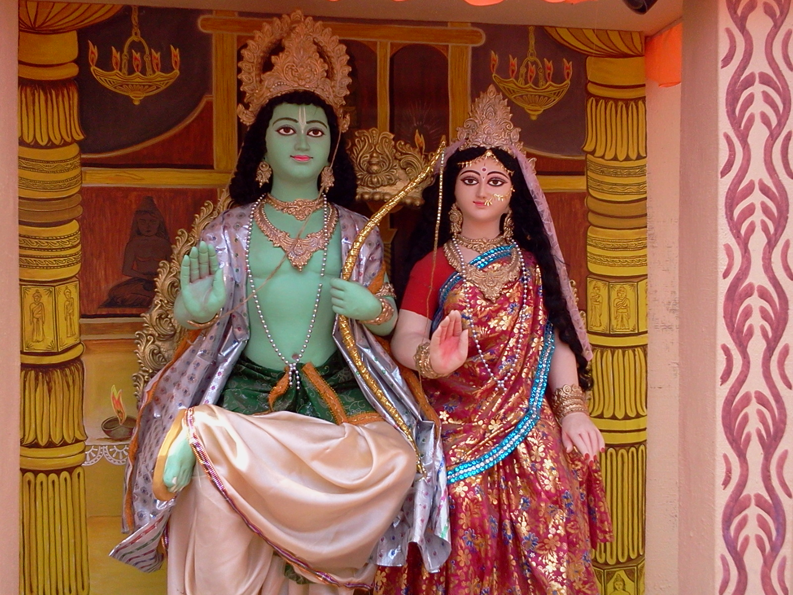 Ram-Sita